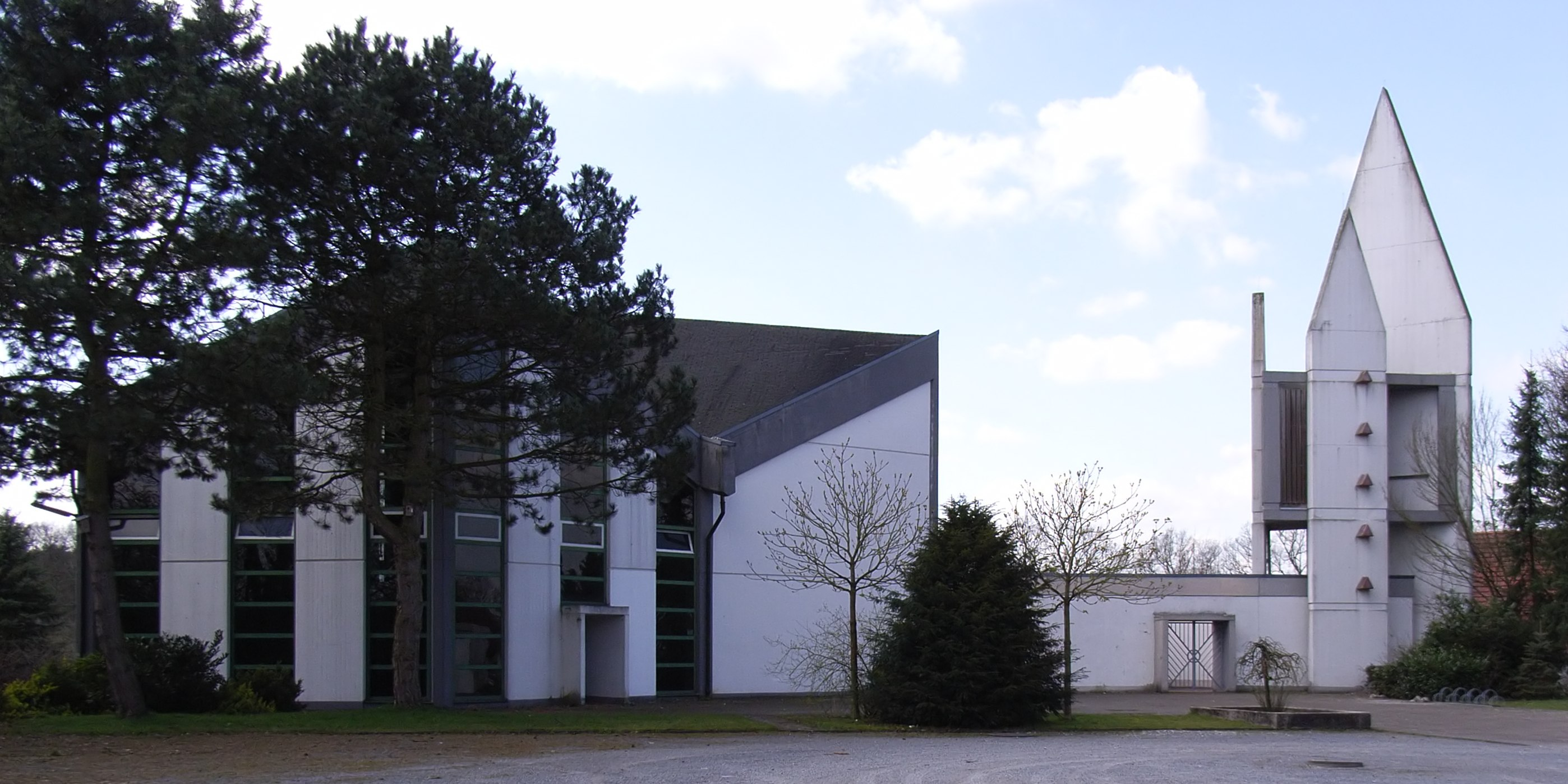 Bielefeld, Deutschland: Kath. St. Johanneskirche in der Windflöte (erbaut 1970, abgerissen im April 2008).